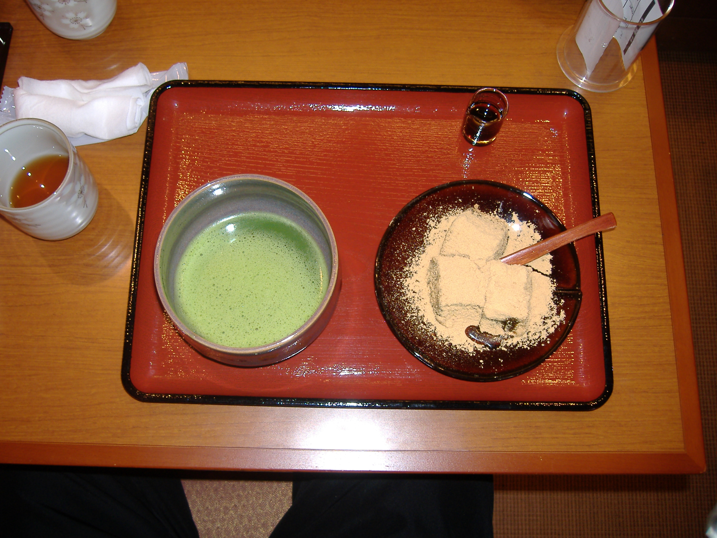 抹茶とわらび餅